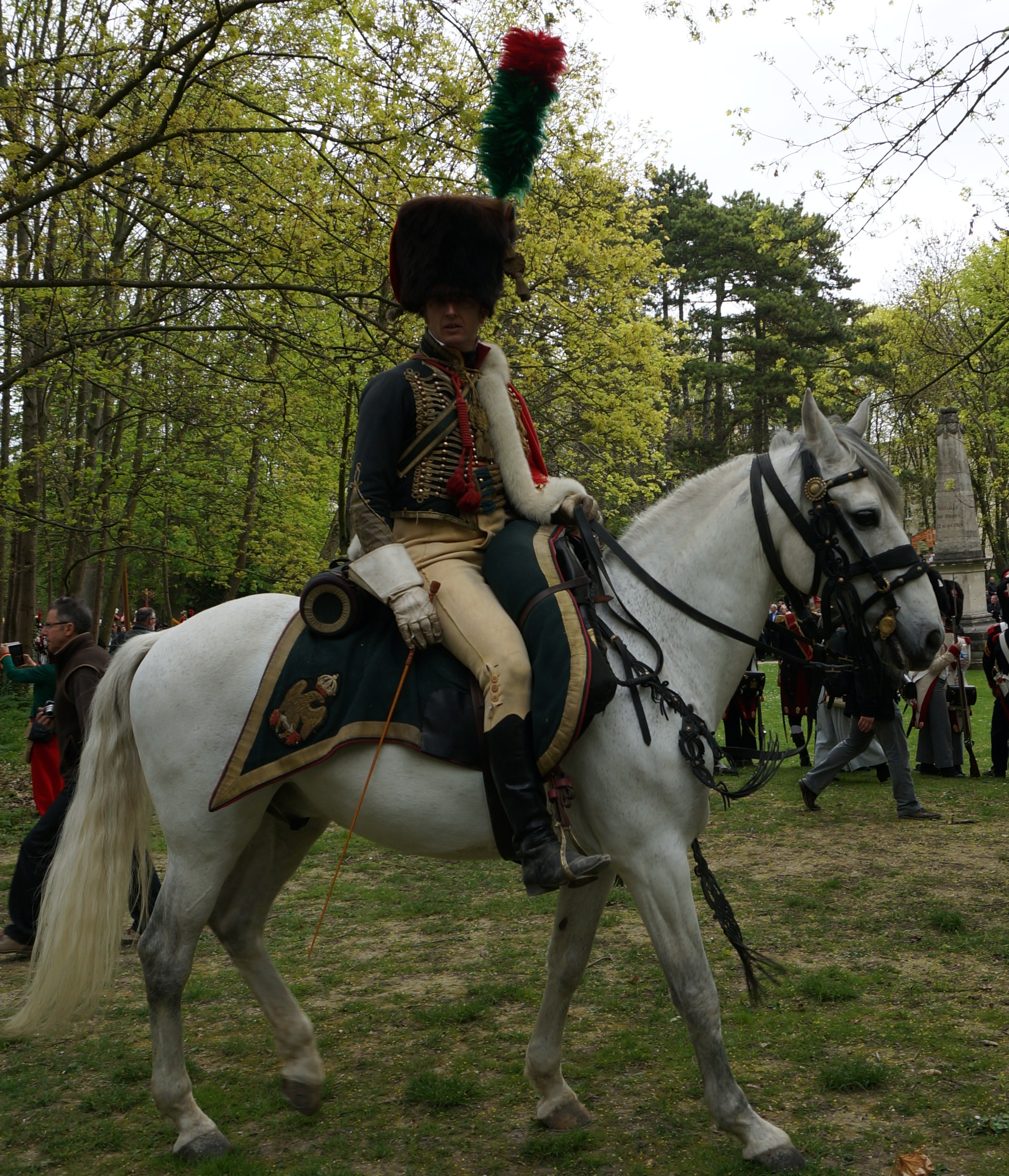 Autour du monument à la bataille de Reims lors de Tinqueux fête Napoléon. Un cavalier des gardes d'honneurs ?